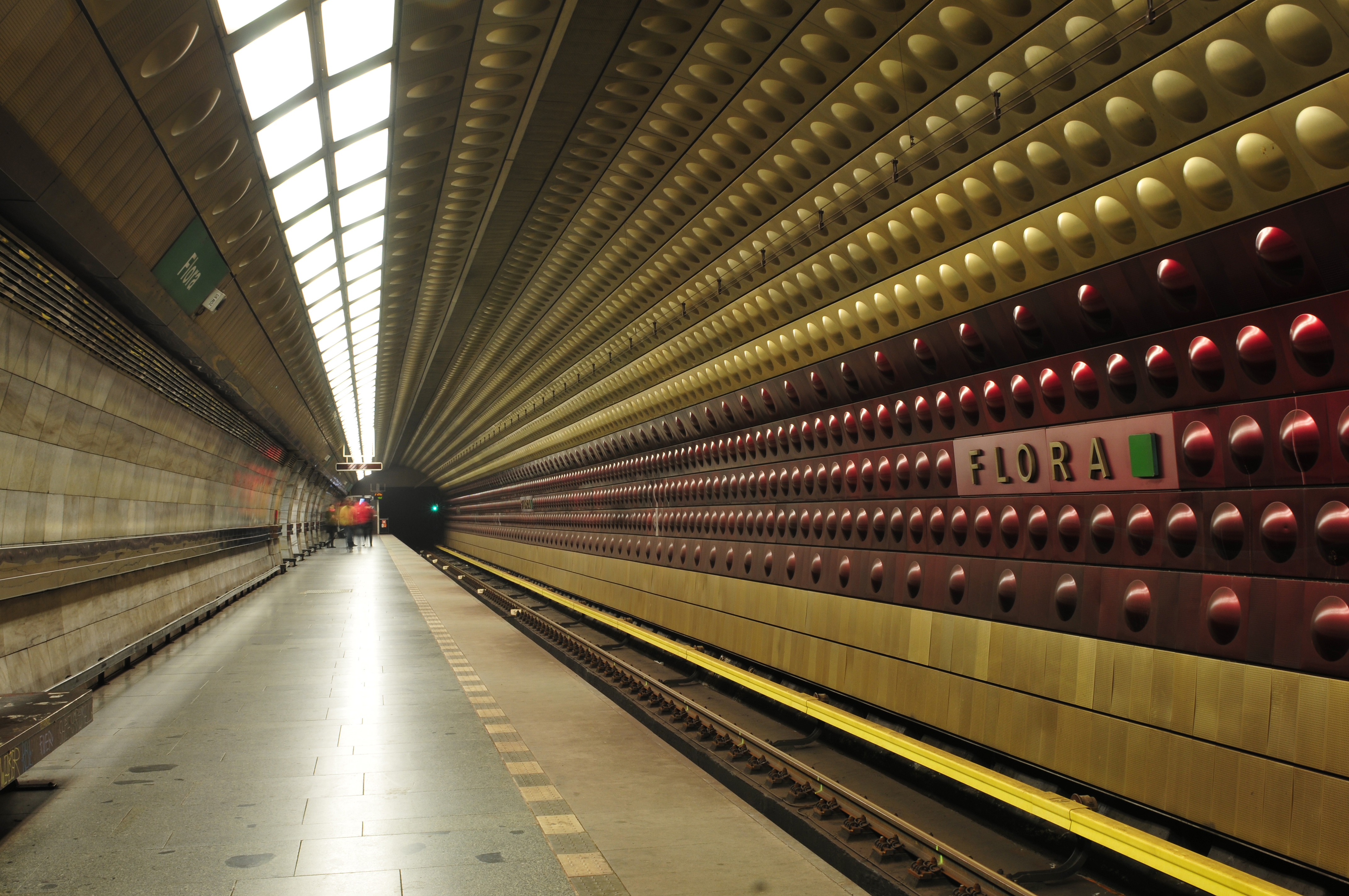 Metro Praha